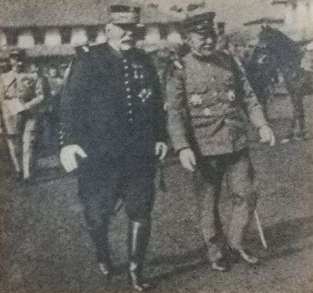 1922年の訪日時のジョゼフ・ジョフル